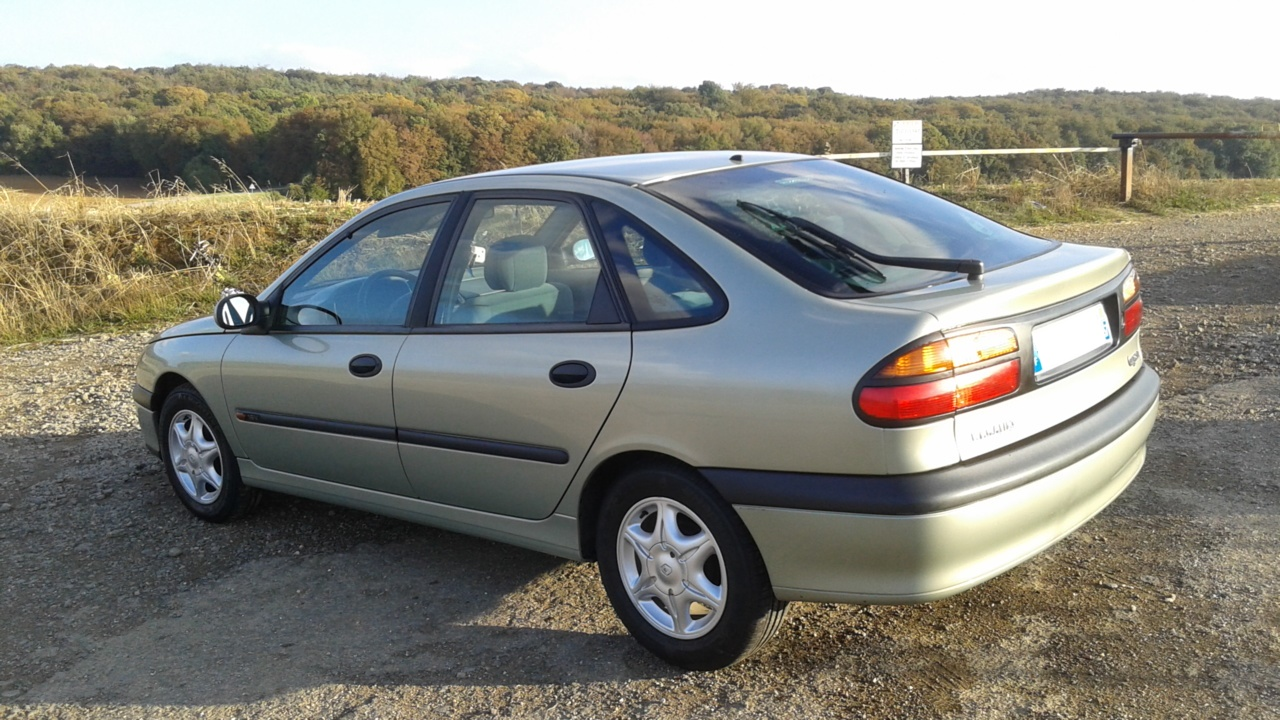 Renault Laguna I phase 2 Pack 1.6 16V